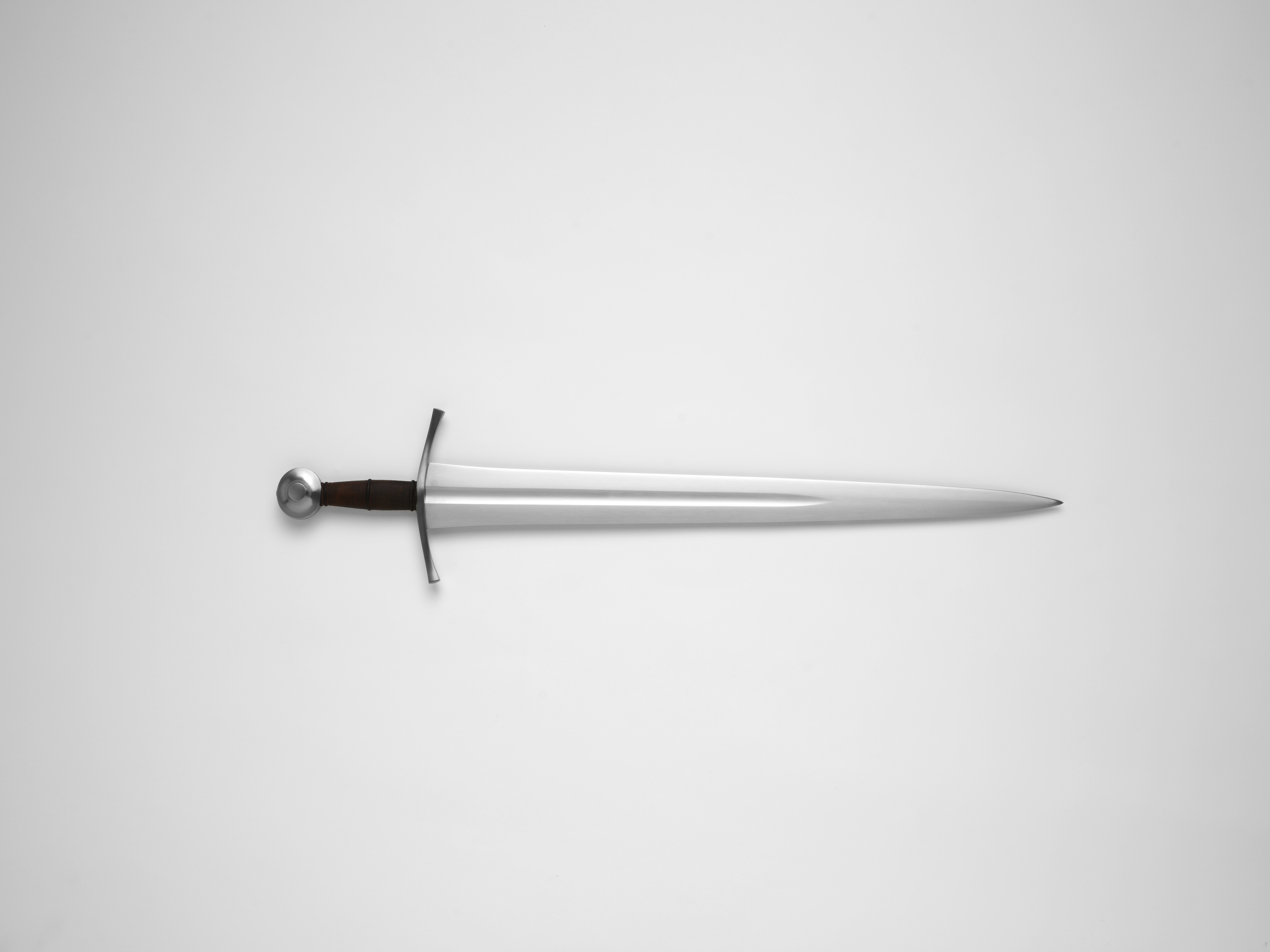 Albion_Yeoman_Medieval_Sword_5